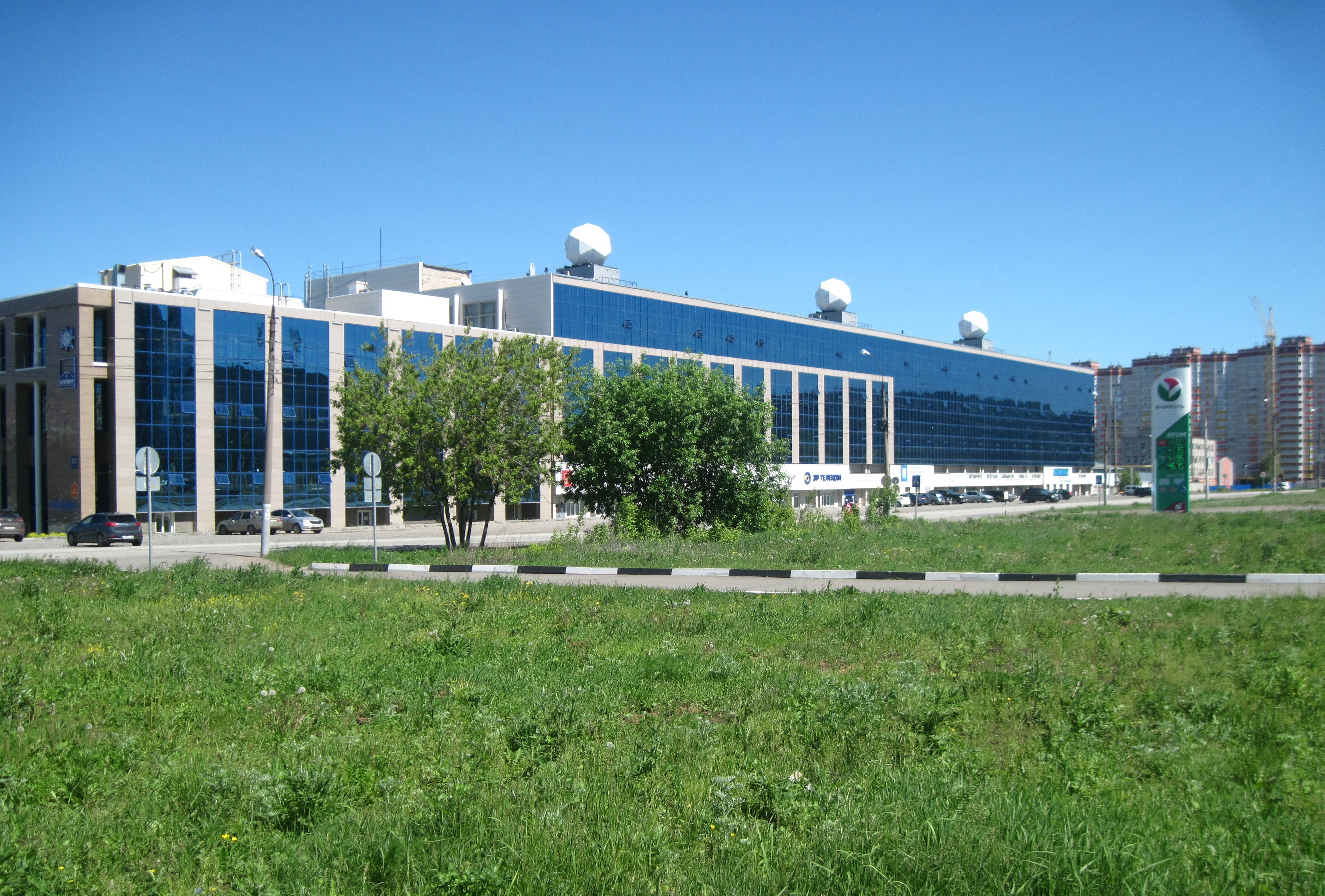 Ижевск, ул.Молодёжная,111